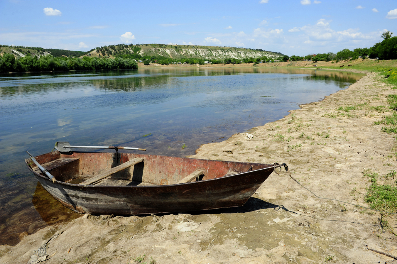 raionul Soroca, la vest de satul Cerlina pe coasta abruptă a Nistrului A-011